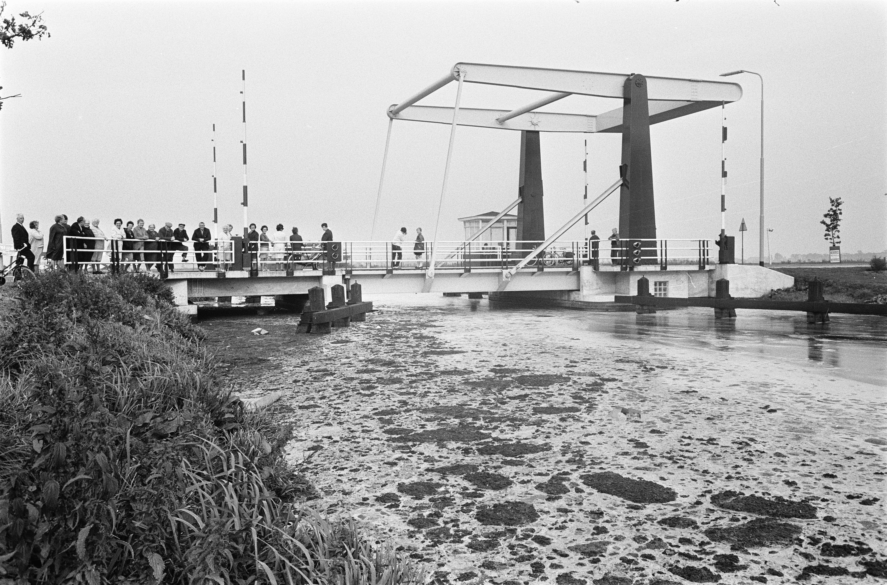 Collectie / Archief : Fotocollectie Anefo Reportage / Serie : Koningin Juliana bezoekt Oost-Groningen Beschrijving : Koningin Juliana bezoekt Oost-Groningen. Het gezelschap staat bij het water van het Pekelder Diep Datum : 7 oktober 1969 Locatie : Groningen (provincie), Oude Pekela Fotograaf : Fotograaf Onbekend / Anefo Auteursrechthebbende : Nationaal Archief Materiaalsoort : Negatief (zwart/wit) Nummer archiefinventaris : bekijk toegang 2.24.01.05 Bestanddeelnummer : 922-8499 Reacties Geplaatst door Maaike op 29 juli 2012 - 19:42. De juiste schrijfwijze is: Pekelderdiep